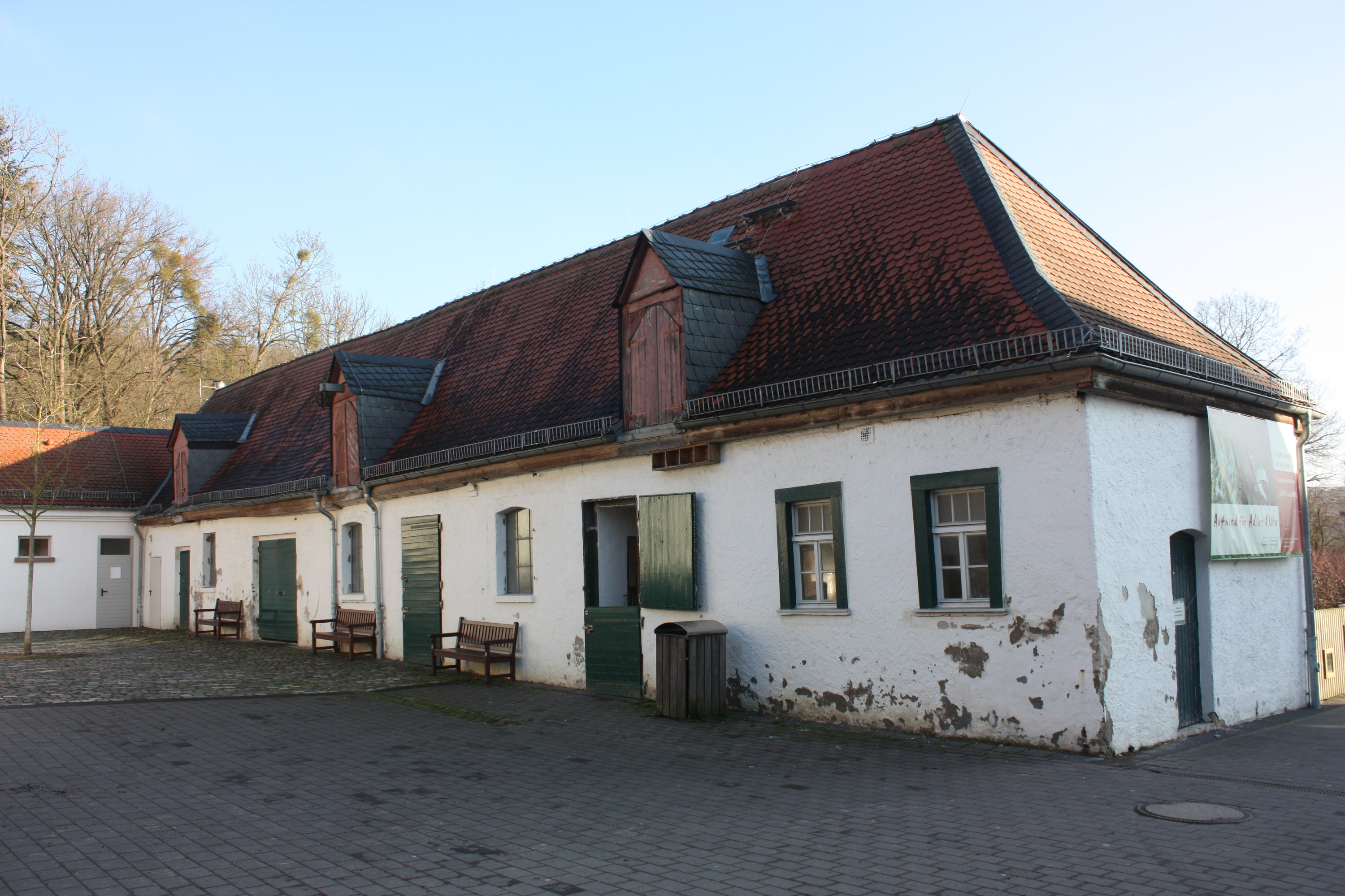 Wiesbaden: Stall am Jagdschloss Fasanerie